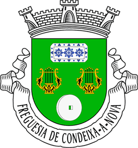 Brasão da Freguesia de Condeixa-a-Nova